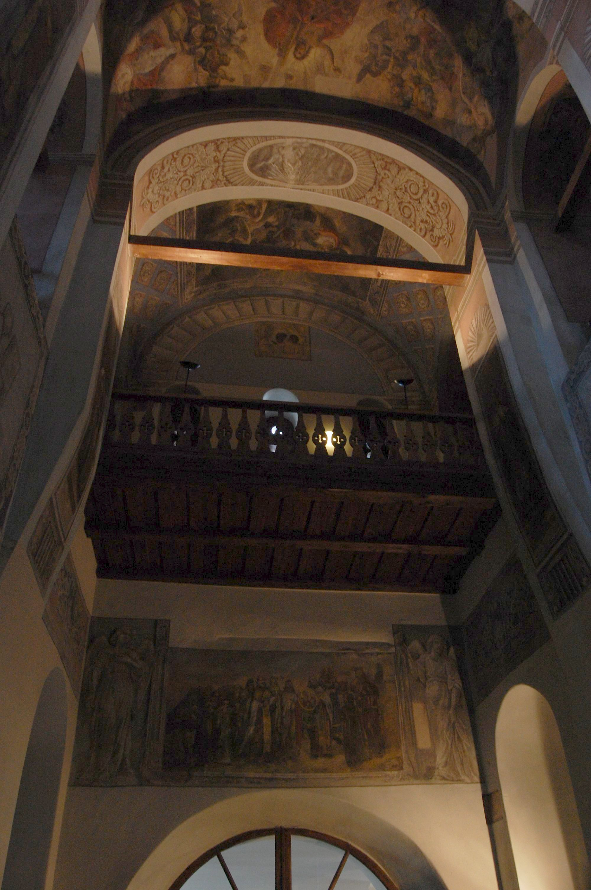 Интерьер Николо-Дворищенского собора в Великом Новгороде.